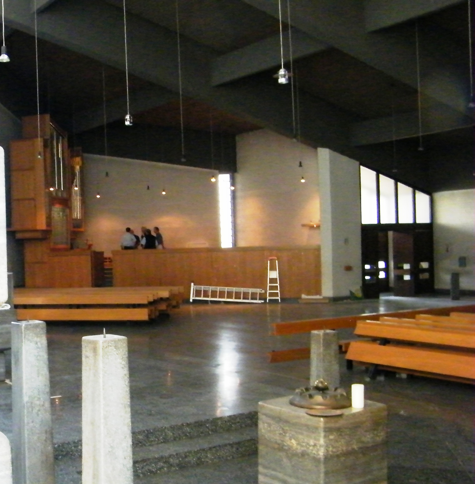 St. Elisabeth Decke